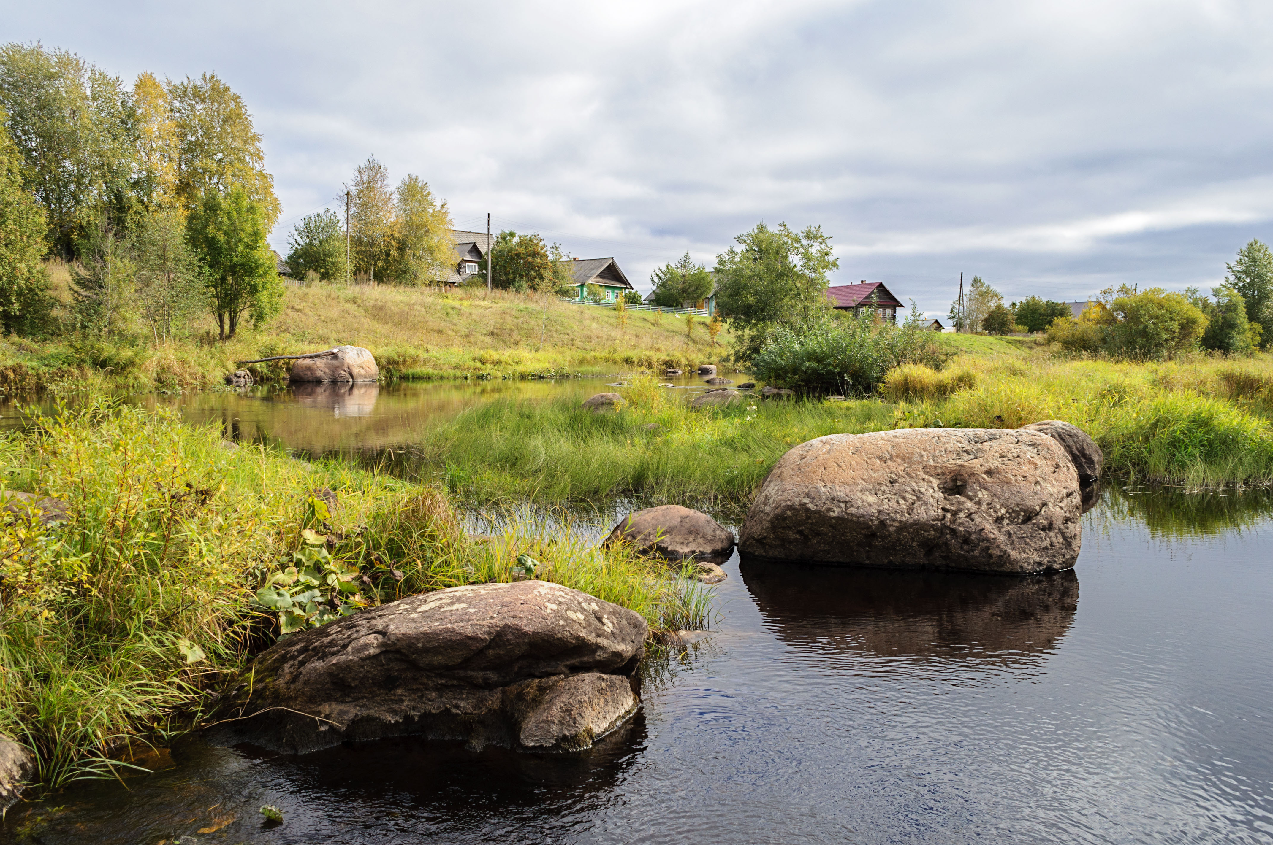 Лачский заказник: на территории Каргопольского сельского лесхоза и юго-западной части озера Лача,Каргопольский район, Архангельская область This image is related to the protected area of Russia number 2910048